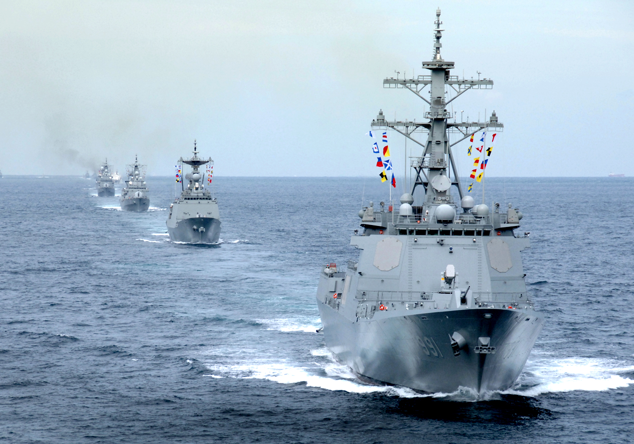 본 사진은 해군에서 촬영한 사진입니다